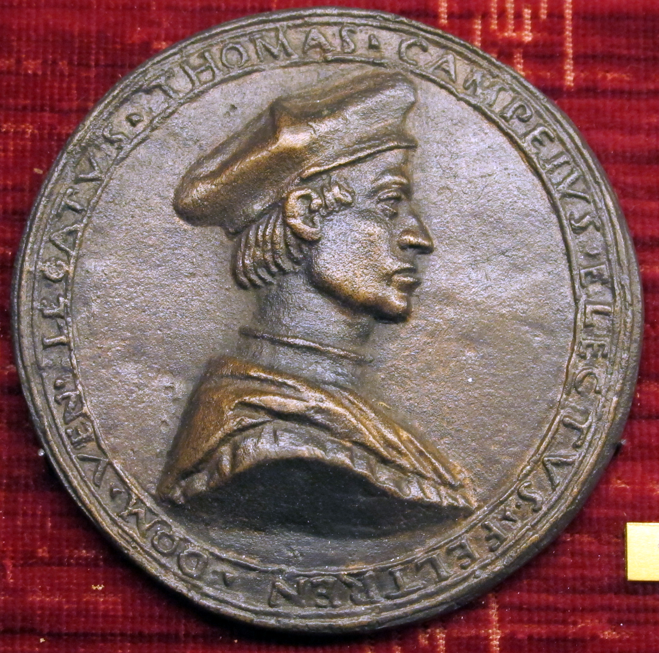 Veneto, medaglia di Tommaso Campeggi (c.1481-1564), vescovo di Feltre